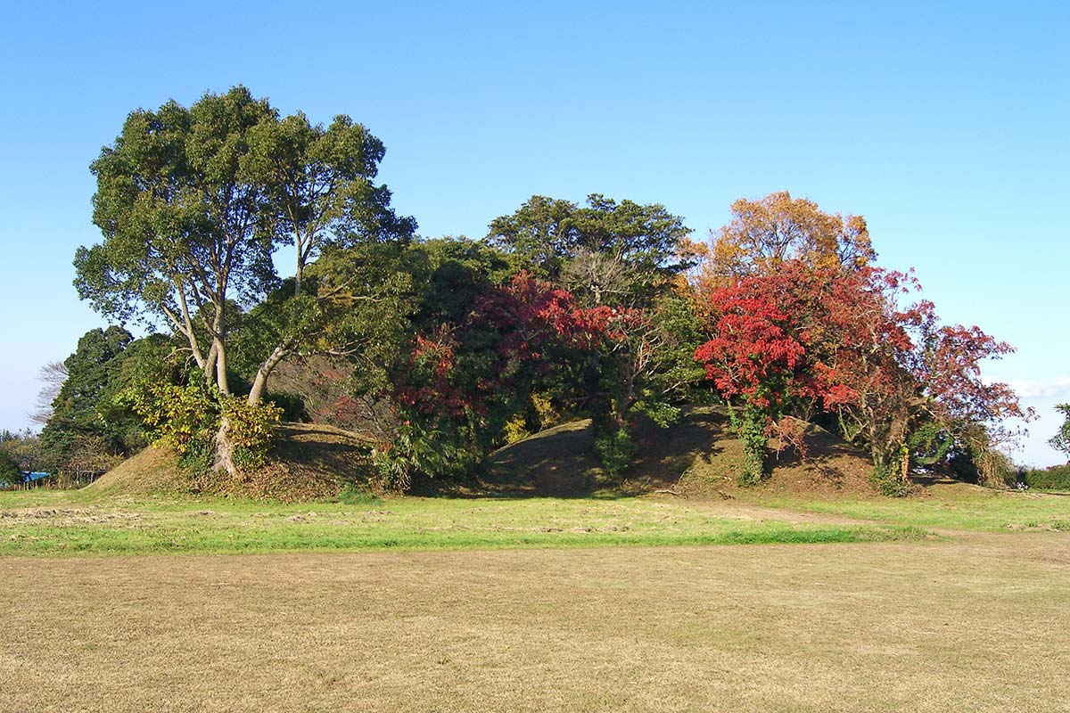 赤塚古墳（川部・高森古墳群）。大分県宇佐市。 南西方向より撮影。Usa, Oita, Japan